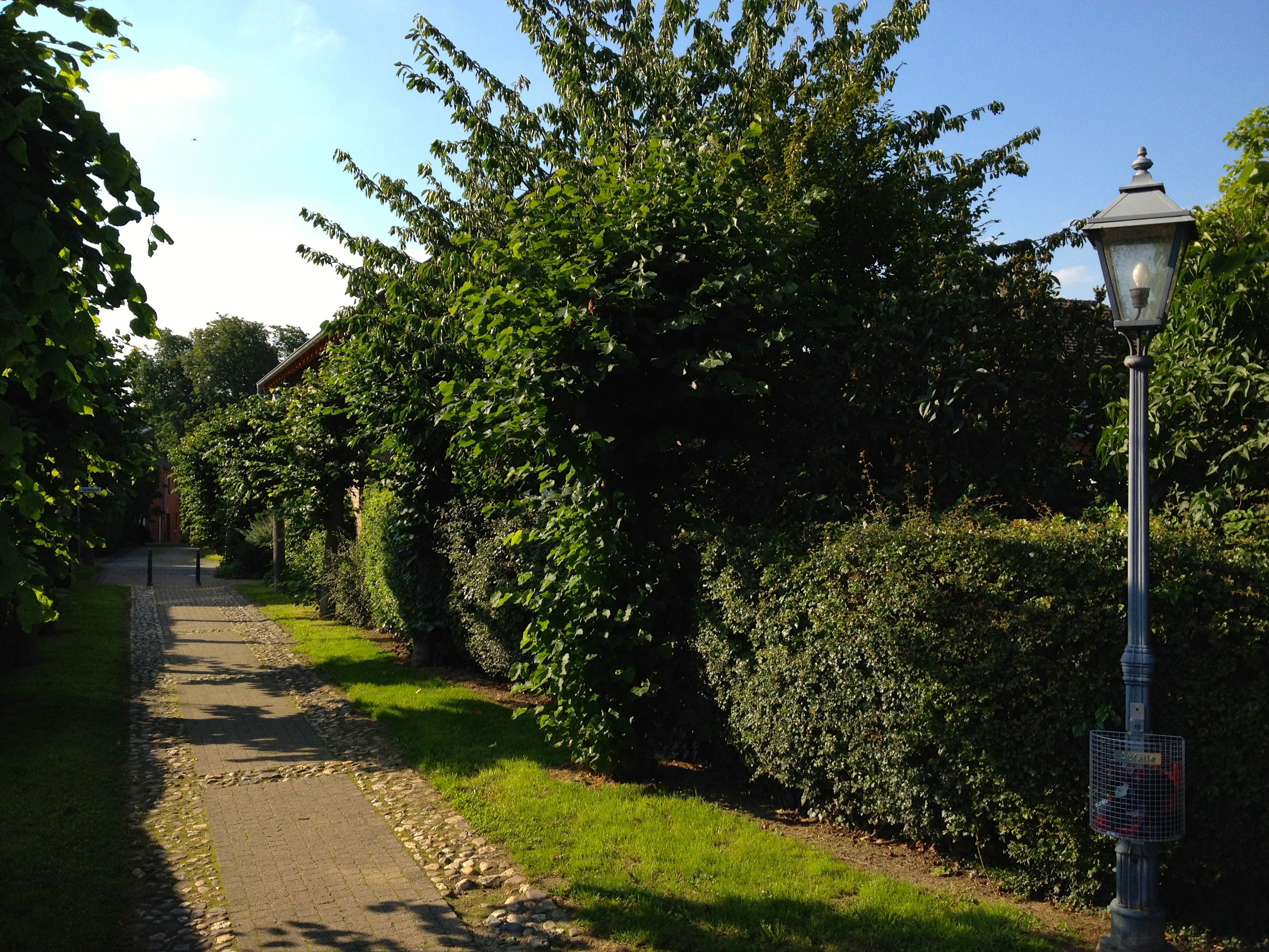 Südpromenade mit Blick nach Nordwesten (Mahrstrasse)